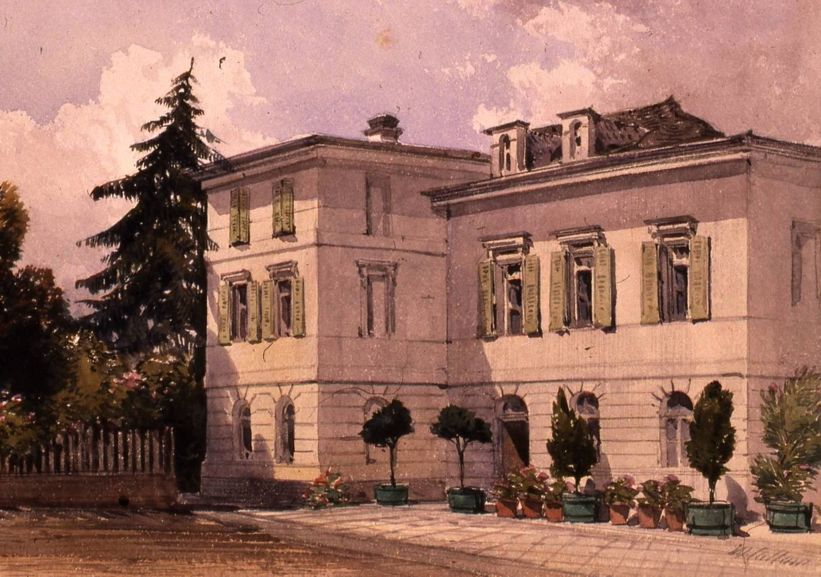 William Callow, Villa Landmeister Kuhn in Gotha, Aquarell, um 1850